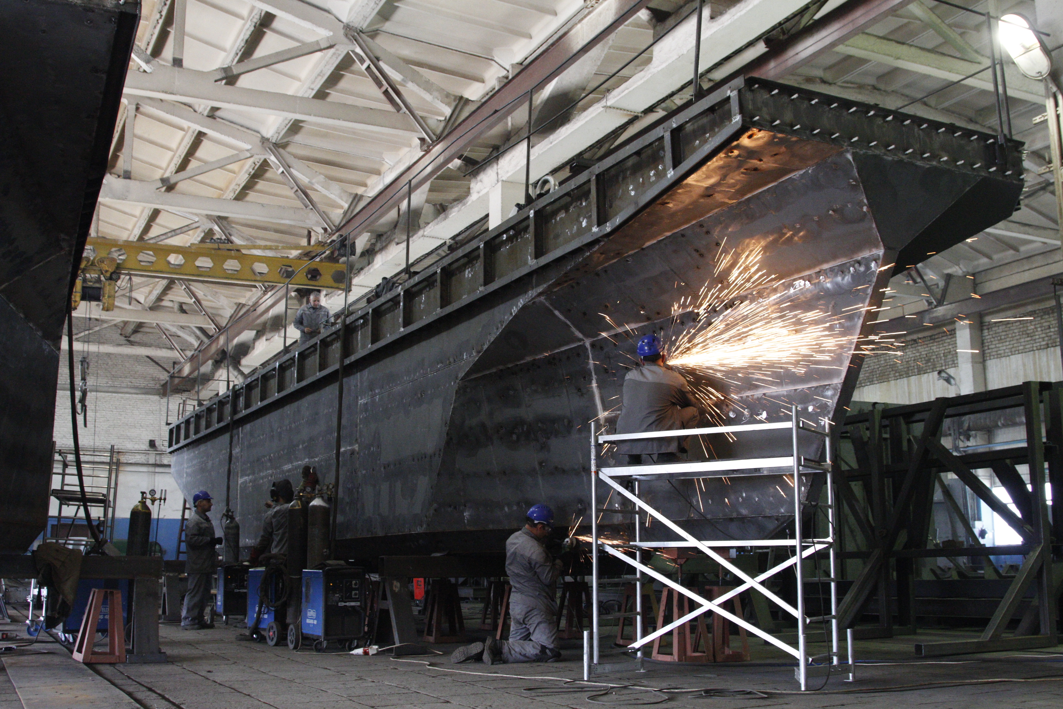 Постройка многофункционального модульного катера в судостроительном цехе предприятия